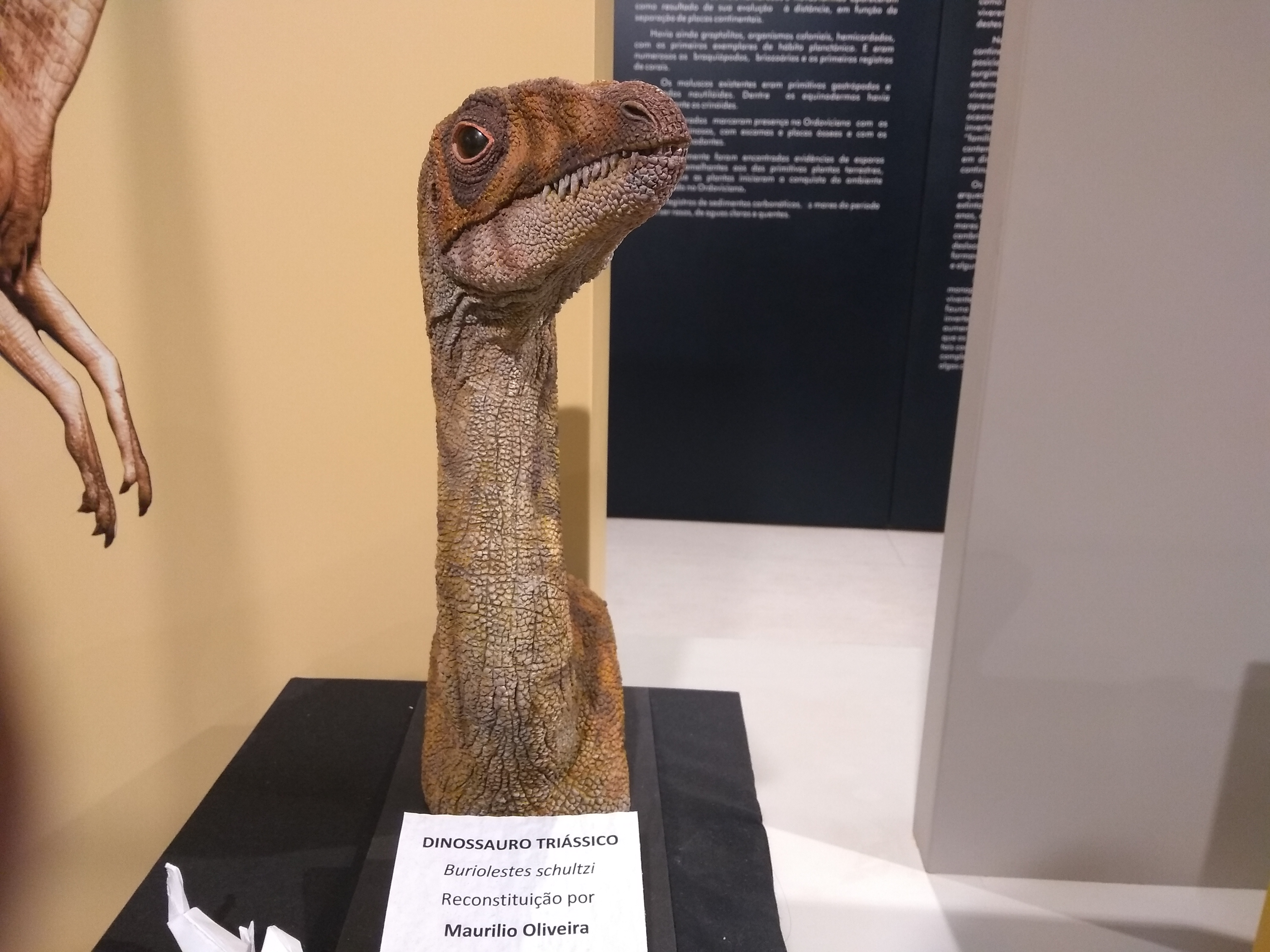 Reconstituição do dinossauro brasileiro Buriolestes schultzi, encontrado em São João do Polêsine, Rio Grande do Sul, Brasil.